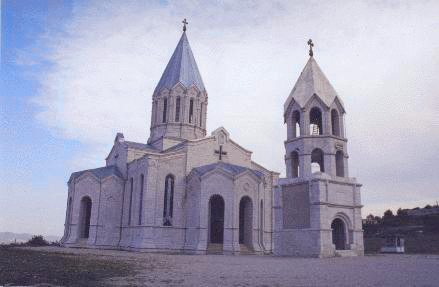 St. Amenaprkitsj, Shoeshi, Bergachtig Karabach